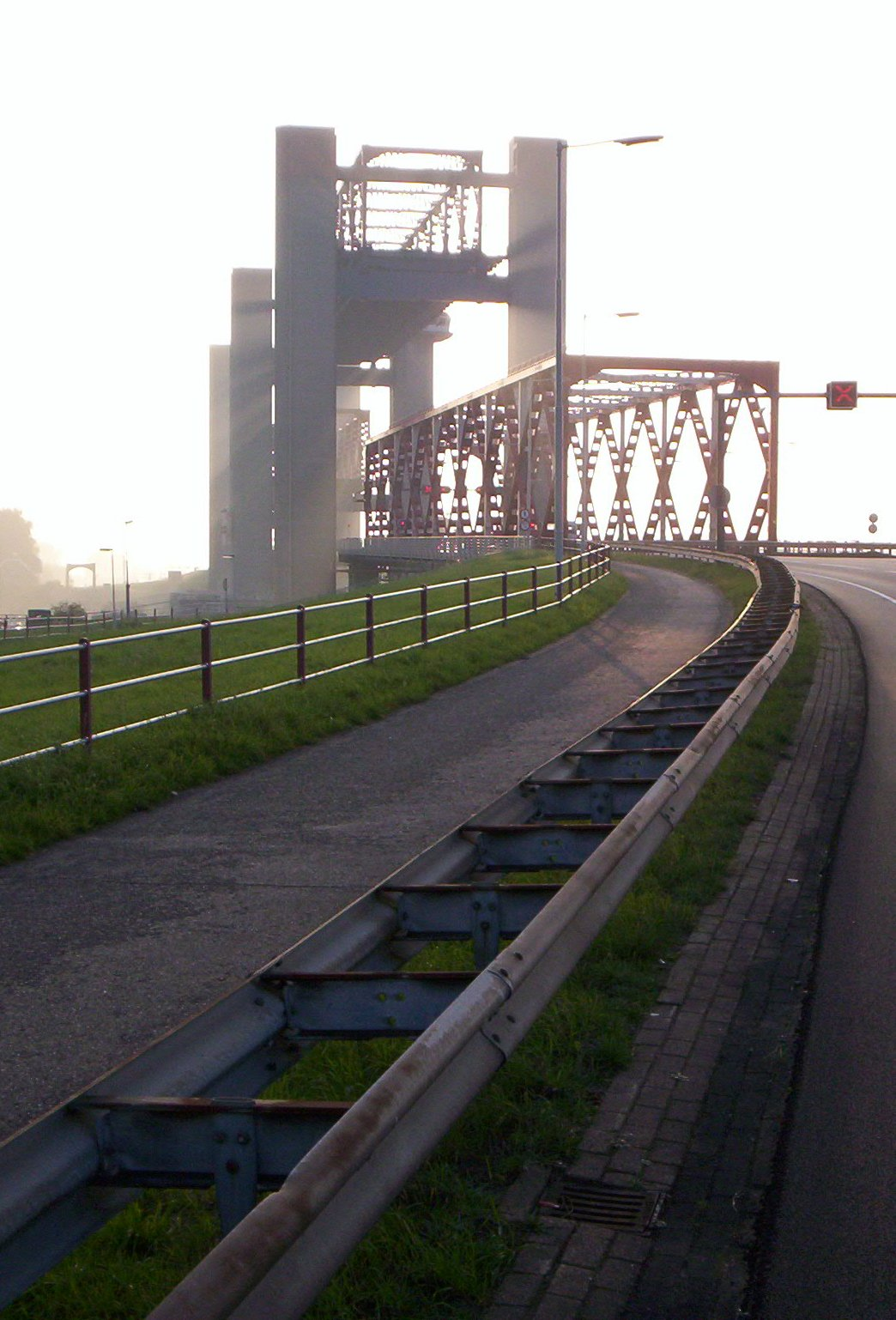 De Spijkenisserbrug op een namiddag in Oktober, 2006. Er zijn twee wegdelen geheven. In de linkermarge van de foto is het monumentale restant van de oude brug zichtbaar.